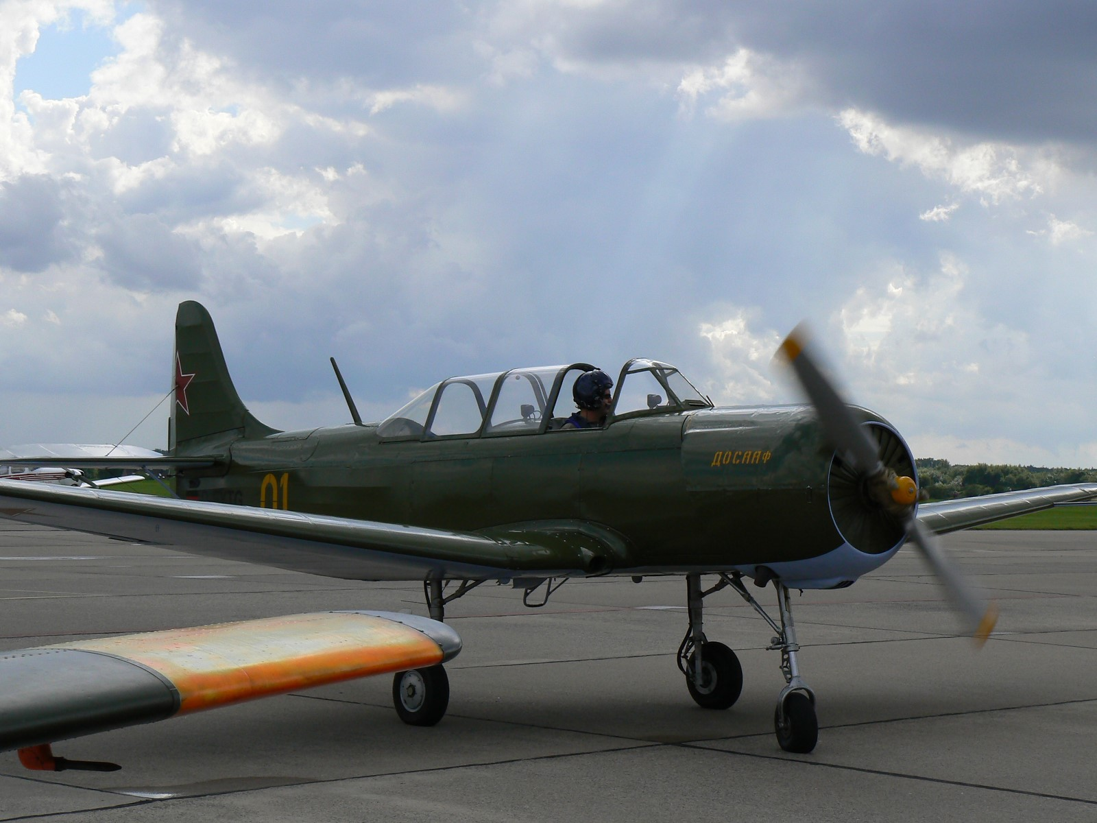 Flugzeug YAK-18A. Ganzmetall-Tiefdecker, Baujahr 1957.